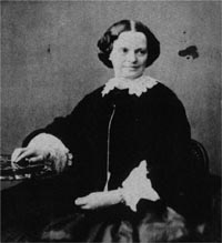 Portrait von Johann Nestroys Lebensgefährtin Marie Weiler (1809–1864). Datum und Urheber unbekannt.